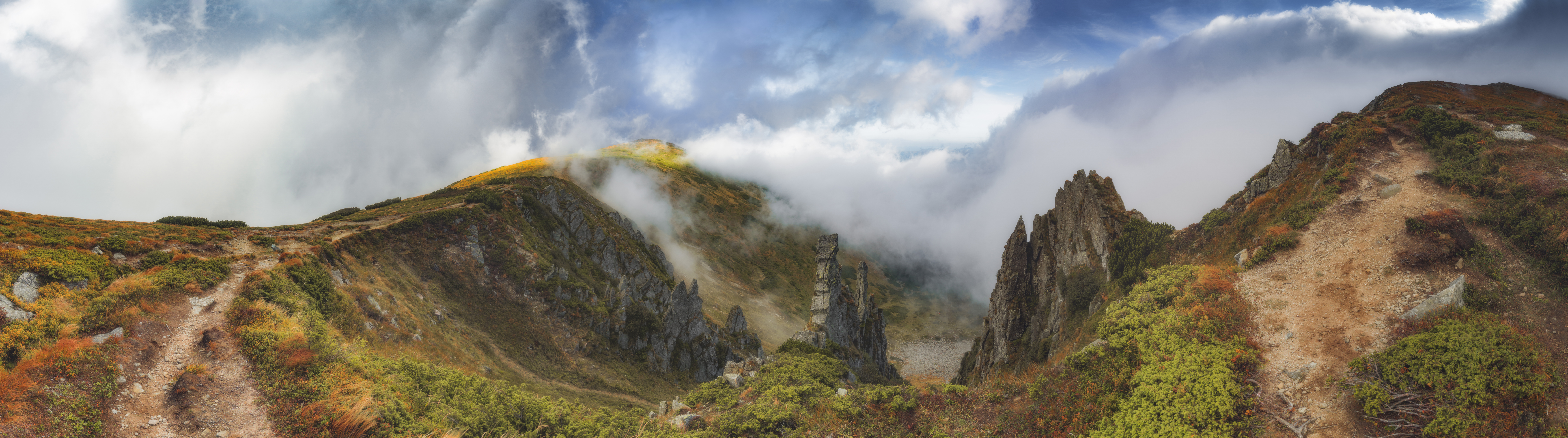 Карпатський біосферний заповідник, Рахівський, Тячівський, Хустський, Виноградівський райони